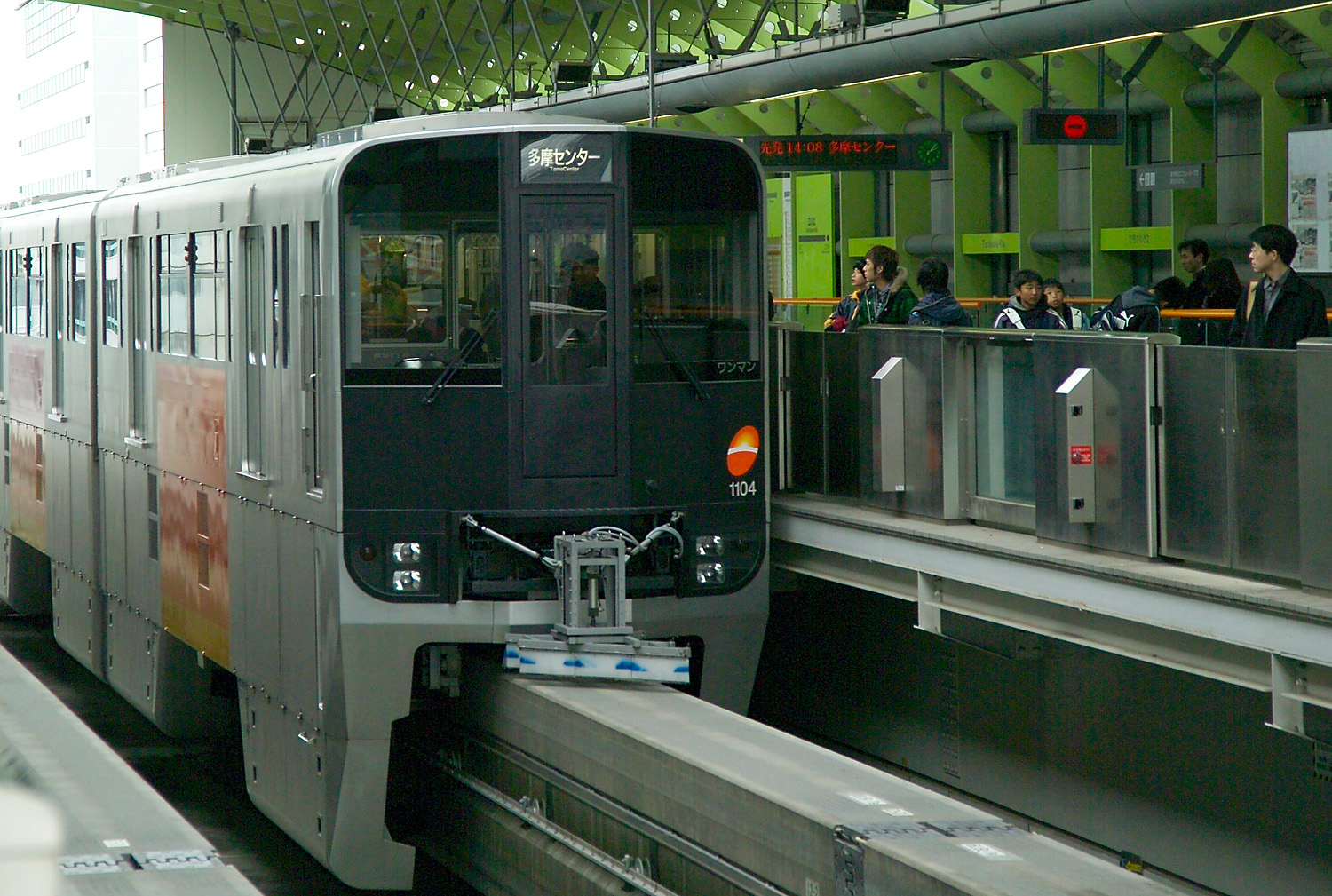 Tama Toshi Monorail Tachikawa Tokyo Japan